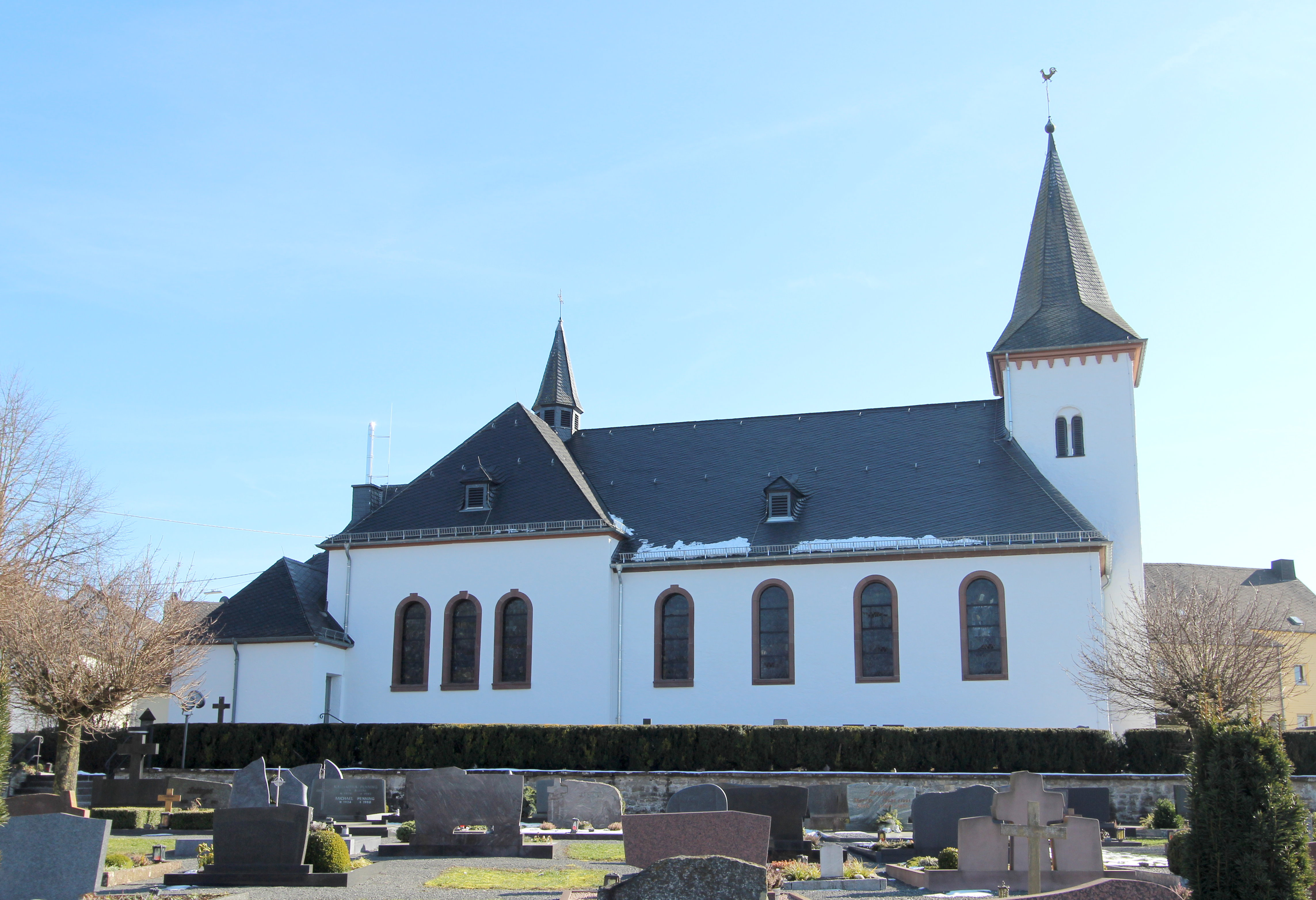 54634 Bitburg-Mötsch, Ringstraße. Mittelalterlicher Westturm, Schiff bezeichnet 1786, Querhaus mit Vierungstürmchen 1922/23, Architekt Eduard Endler, Köln; das ehemalige Südportal heute Ehrenmal; Epitaph, Rotsandstein, bezeichnet 1600, Nachfolge der Trierer Bildhauerschule des Hans Ruprecht Hoffmann; Kirchhofskreuz, 1873. Aufnahme von 2018.